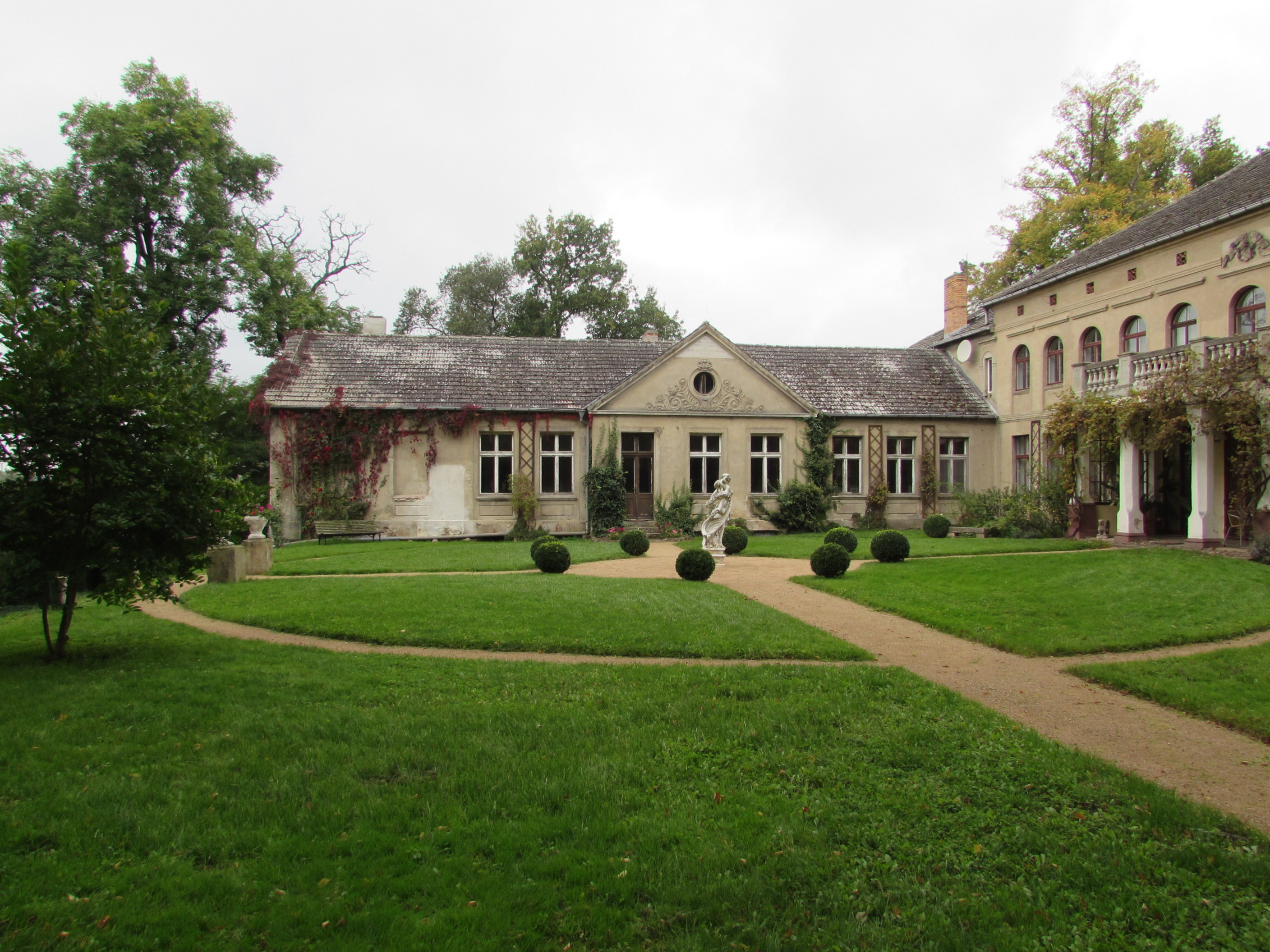 gutshaus rogäsen westflügel garten